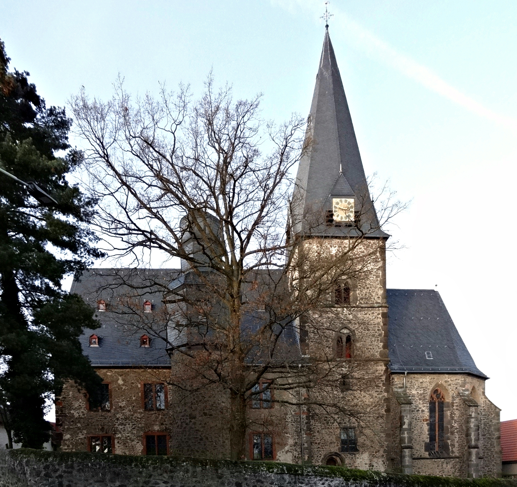 Evangelische Stadtkirche Hungen